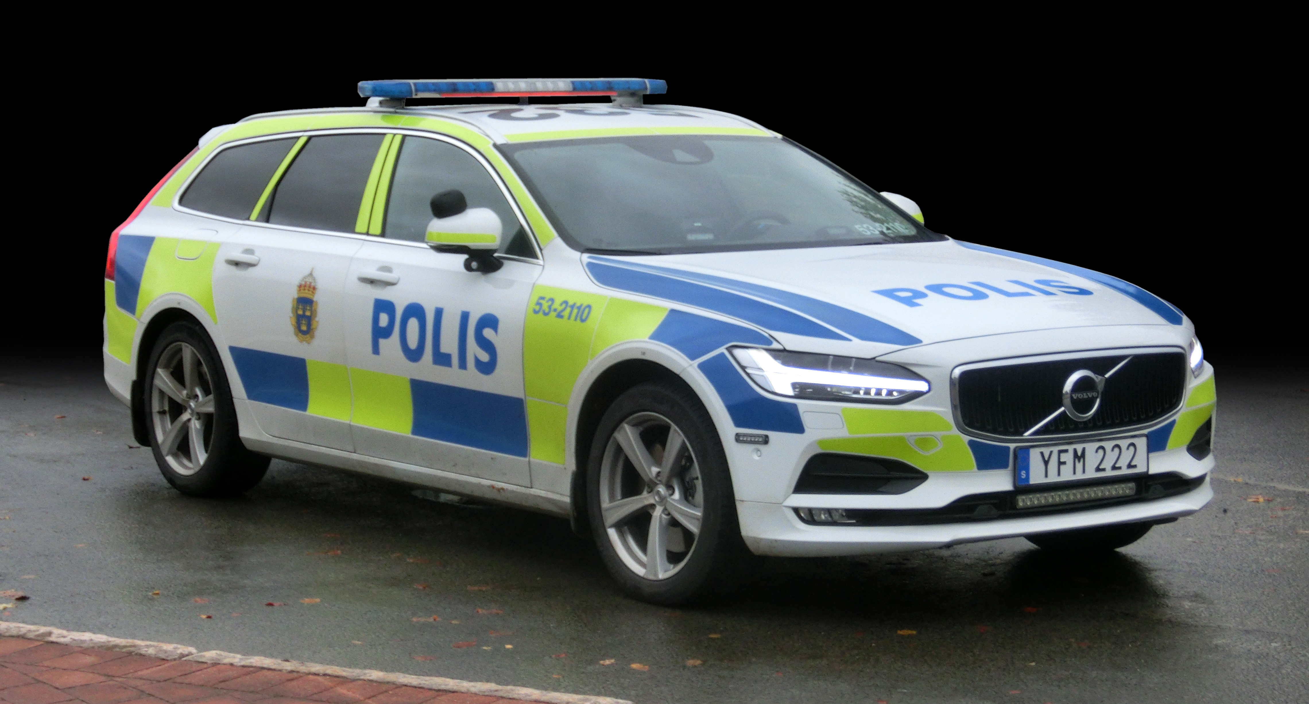 En vit, blå och gul polisbil av märket Volvo årsmodell 2017 fotograferad på en gata i Falköping, Falköpings kommun, f.d. Skaraborgs län, Västergötland, Västra Götalands län, Sverige.